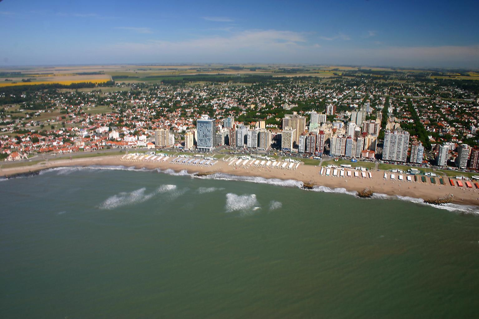 MIRAMAR Vista Aerea